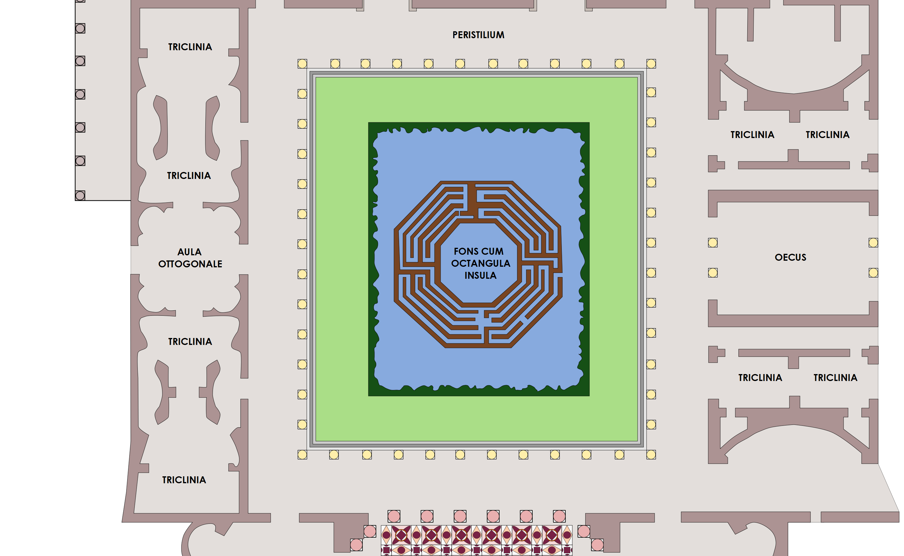 Pianta della parte centrale della Domus Flavia di Domiziano (Roma - Palatino; 81-92 AD); architetto Rabirio. Questa parte è stata denominata anche peristilium